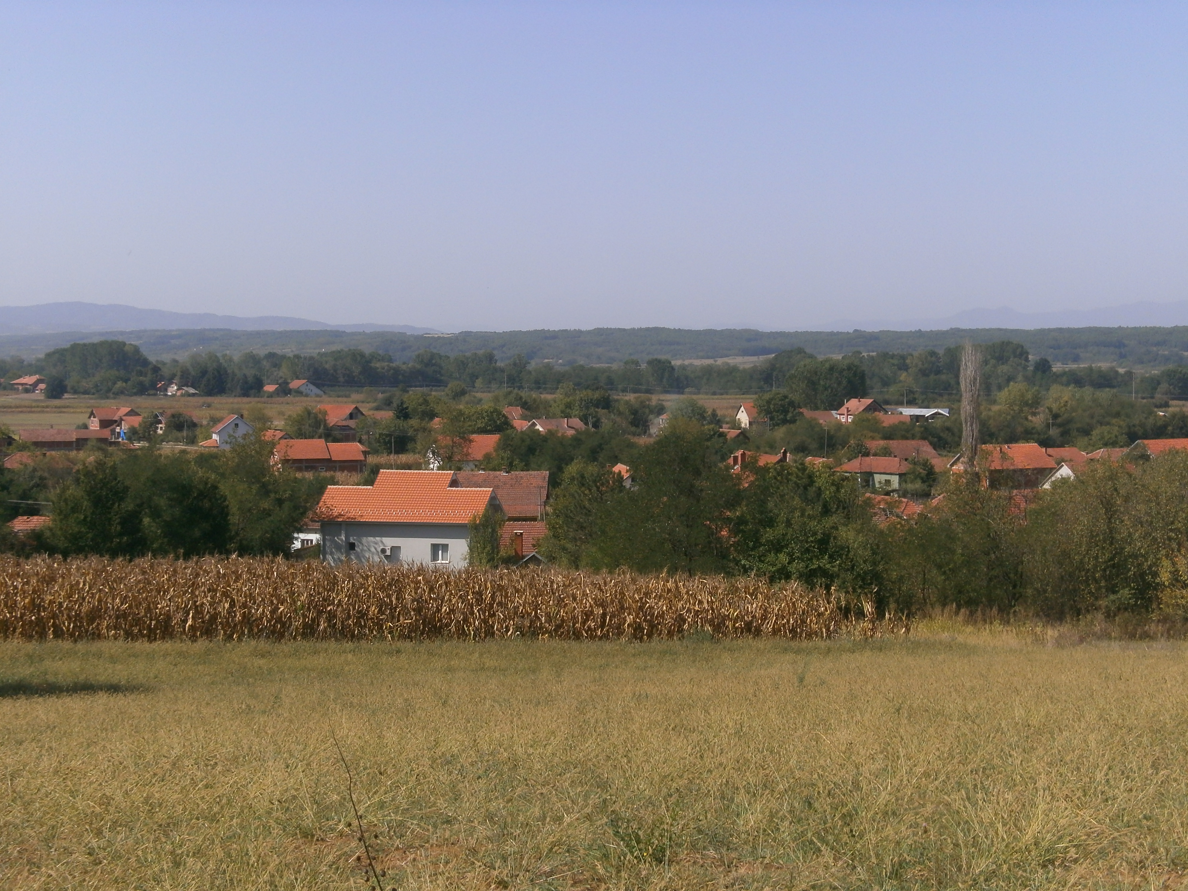 Srpski (latinica): Šainovac, Leskovac